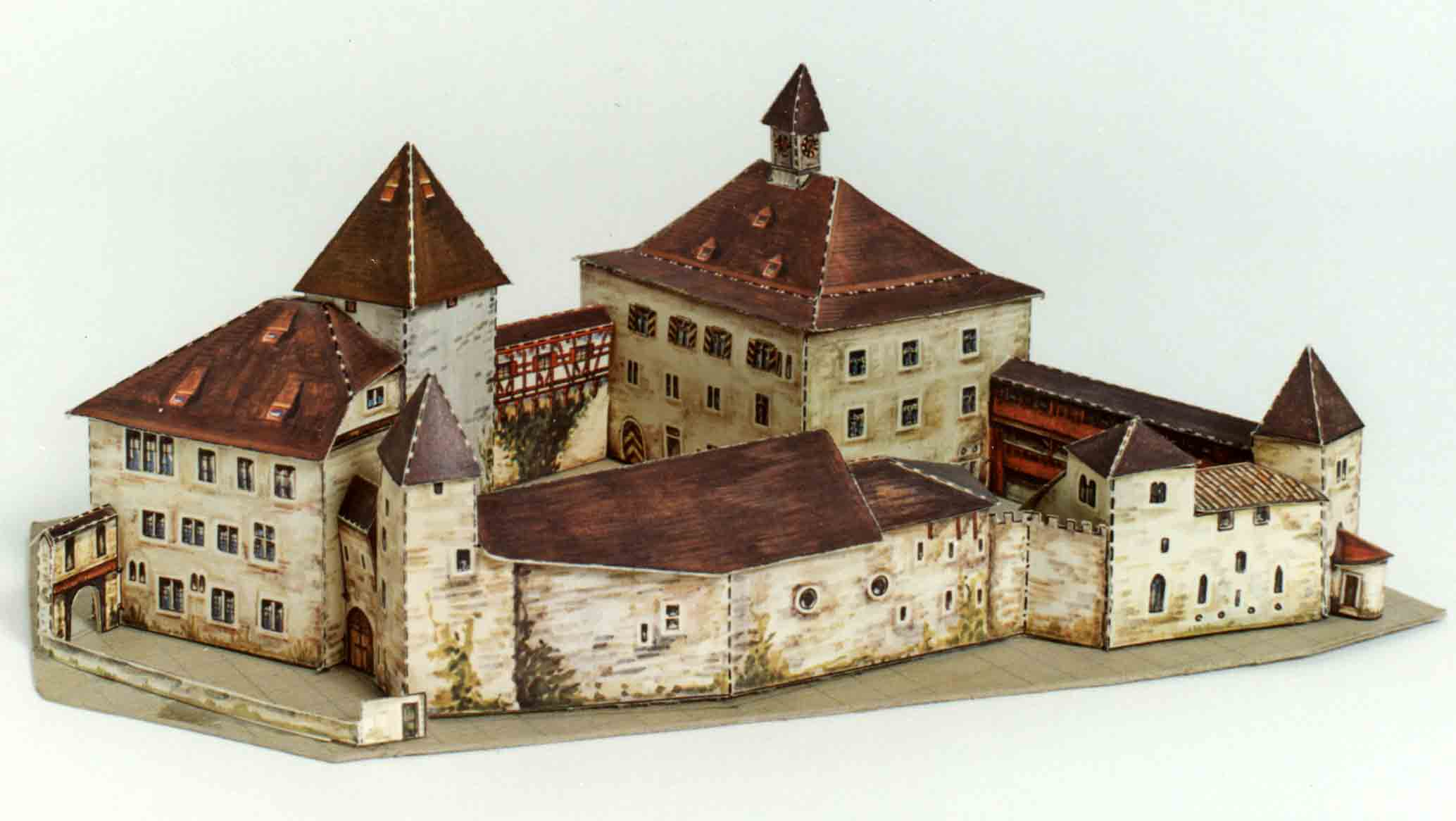 Kartonmodell der Burg Kyburg, ein Modell des Verlages Pädagogischer Verlag des Lehrerinnen- und Lehrervereins Zürich von Heinrich Pfenninger